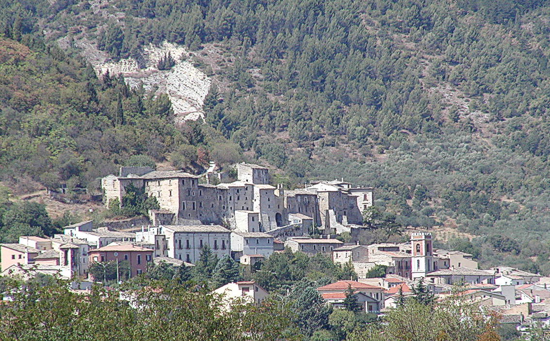 Castello di Vittorito